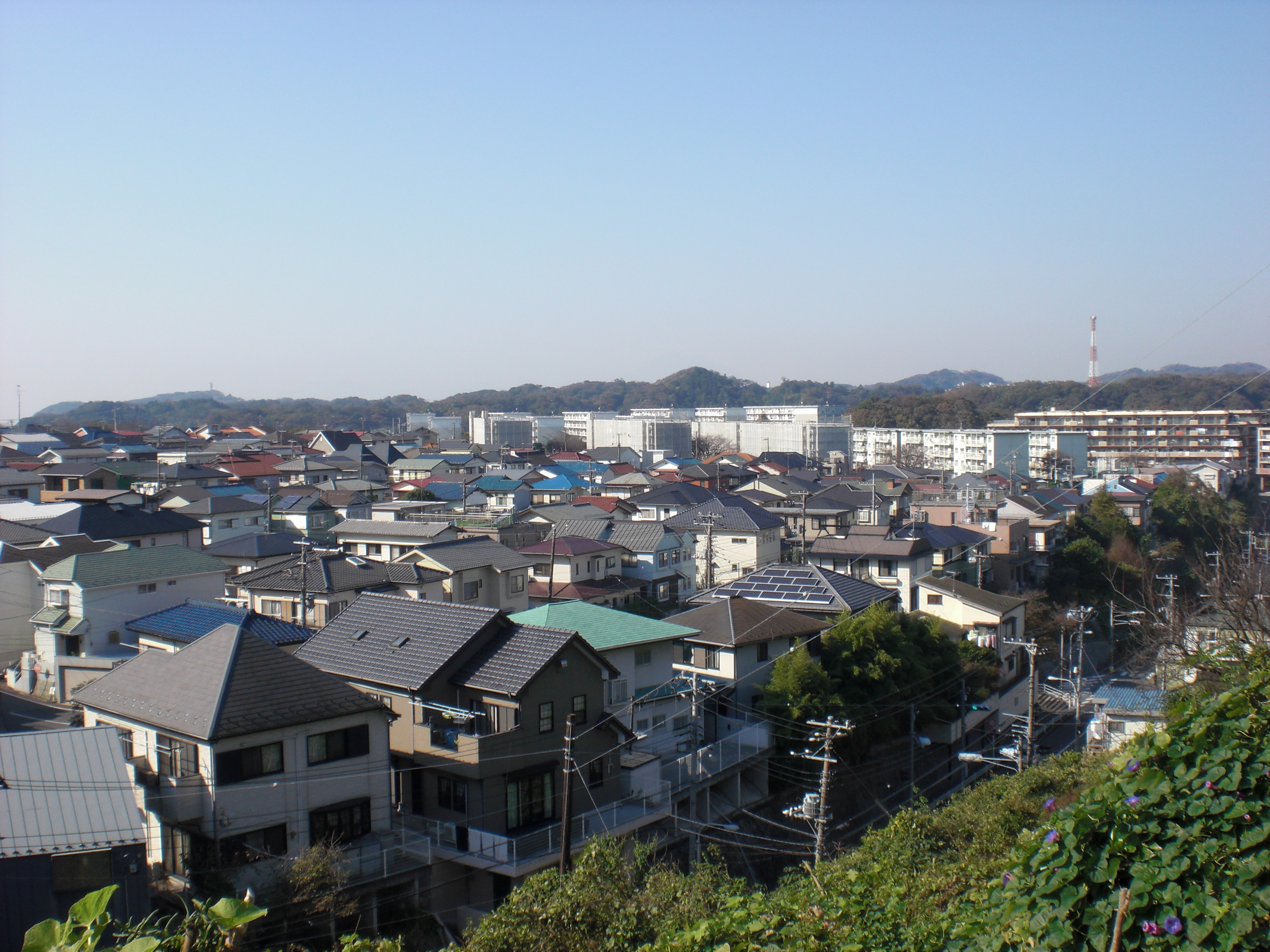 夕日が丘より池子2丁目